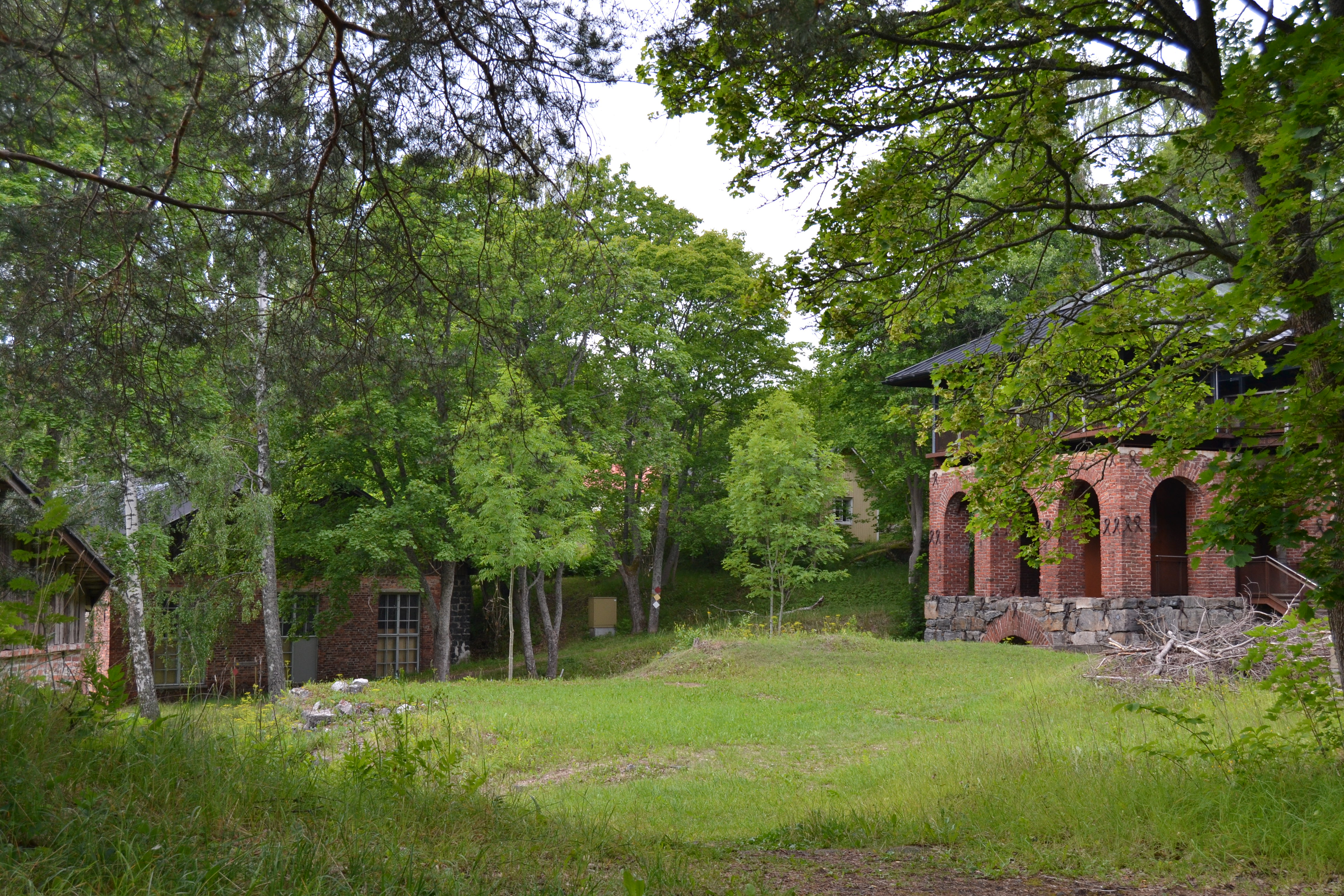 Taalintehtaan ruukki; kulttuuriperintökohde, Kemiönsaari